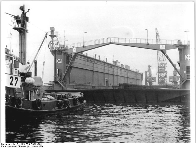 Rostock, Überseehafen, Warnow-Werft, Schwimmdock Zentralbild Lehmann Th-Qu AV. v. 8.1.1966 9.1.1966 Neues Schwimmdock im Rostocker Überseehafen Ein Schwimmdock, daß Schiffe bis zu 10000 (10000) TDW aufnehmen kann, wurde am 7.1.1966 in den Rostocker Überseehafen bugsiert. Es ist auf der Dock-Baustelle Blexen (Unterweser) der Gutehoffnungshütte Sterkrade für die Warnowwerft gebaut worden. Mit der Inbetriebnahme dieses 2. Docks wird die Werft ihre Reparaturkapazität bedeutend erweitern können.